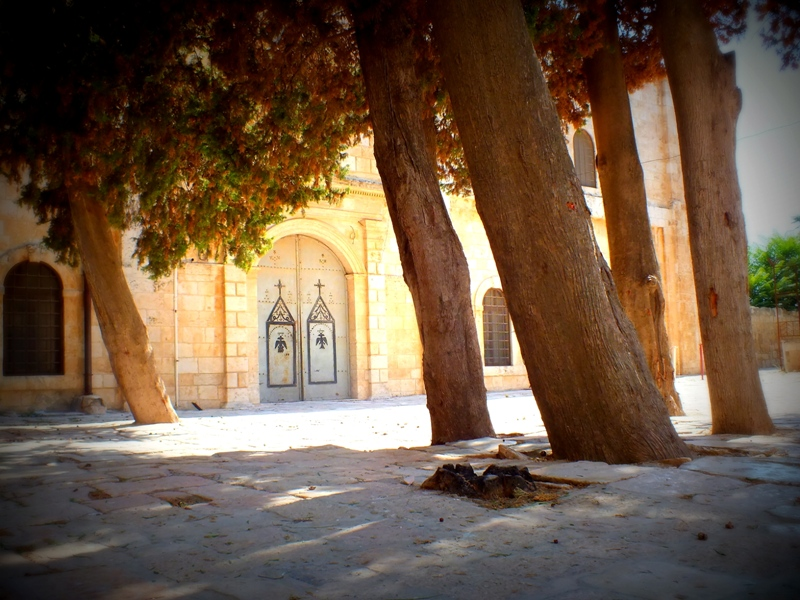 երուսաղեմի ժառանգավորաց վարժարան